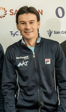 El presidente de la Asociación Argentina de Tenis, Agustín Calleri; el secretario de Deportes de la Nación, Javier Mac Allister y los capitanes del equipo de Copa Davis, Gastón Gaudio y Guillermo Coria, brindaron una conferencia de prensa en el CeNARD donde anunciaron la nómina que enfrentará a Colombia, del 14 al 16 de septiembre en San Juan.